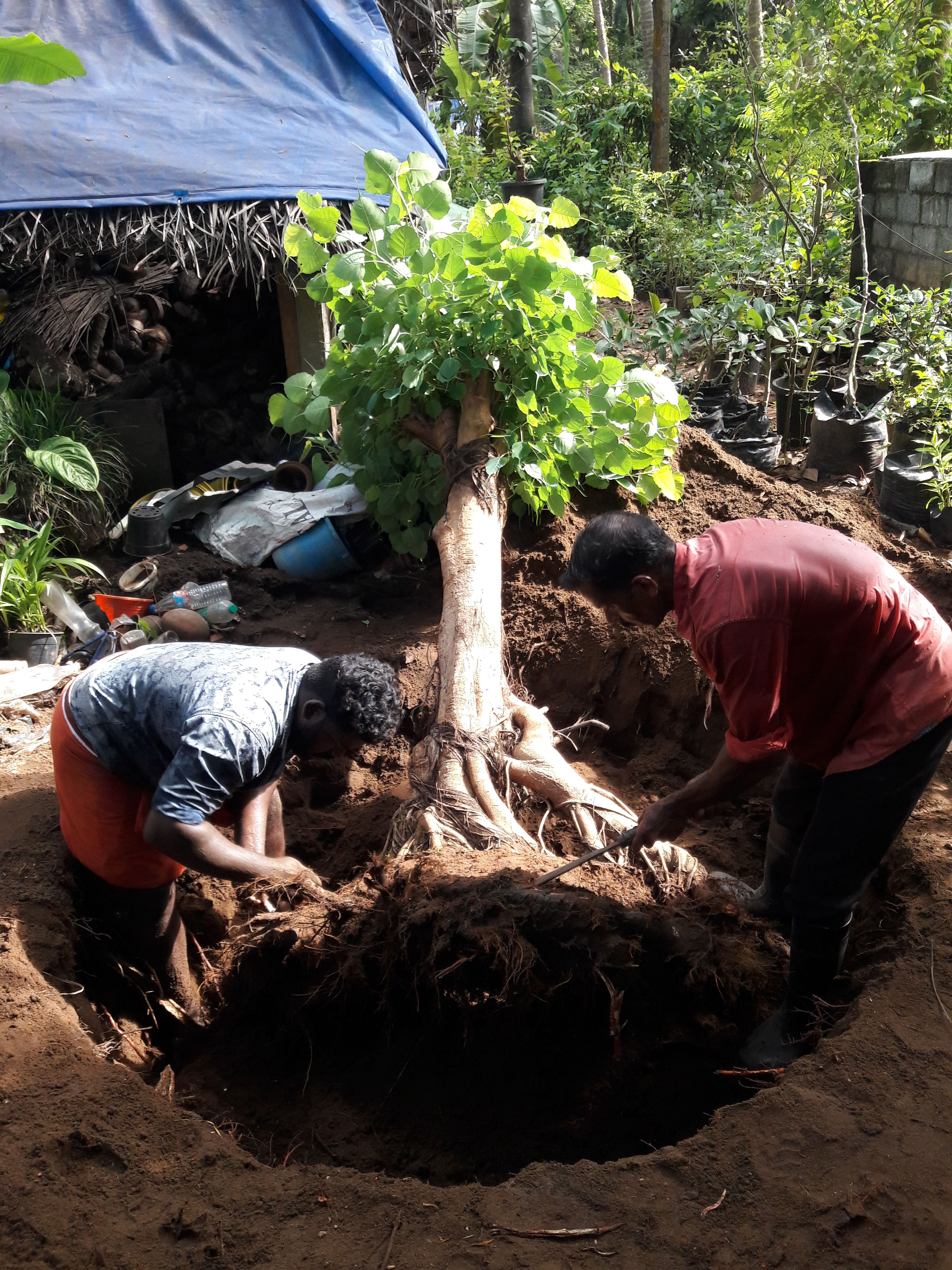 മലപ്പുറം ജില്ലയിലെ പൊന്നാനി താലൂക്കില്‍ വെളിയംകോട് സ്കൂള്‍പടിയില്‍ ആസ്ഥാനമായ് പ്രവര്‍ത്തിച്ച്‌ വരുന്ന സൊസൈറ്റി ആക്റ്റ് രജിസ്ട്രേഷന്‍ (MPM/CA/765/2017) പ്ലാന്‍റ് വില്ലേജ് ചാരിറ്റബിള്‍ സൊസൈറ്റി (Plant Village Charitable Society ) എന്ന പേരിലുള്ള നേച്ചര്‍ ക്ലബിന്‍റെ അങ്കണത്തില്‍ നിന്ന്, പൊന്നാനി നഗരസഭ തൊഴിലാളികളായ പ്രകാശന്‍,അര്‍ജുനന്‍ ഇവരുടെ സഹായത്തോടെ നഗരസഭ വാഹനത്തിലേക്ക് മാറ്റാന്‍ ശ്രമം. Peepal tree ശാസ്ത്രീയ നാമം Ficus religiosa കുടുംബം Moraceae.